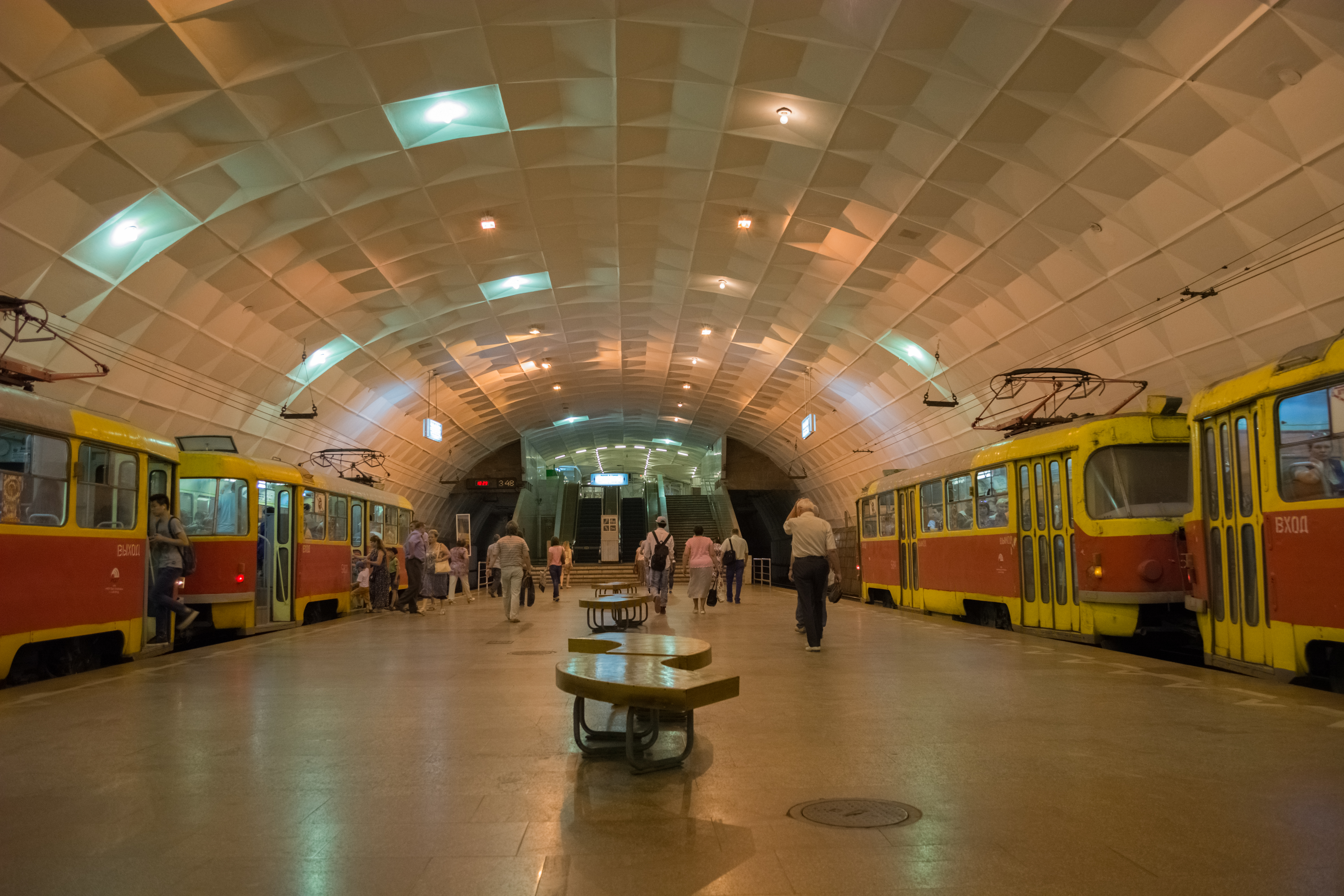 Город Волгоград: Волгоград, Волгоградская область